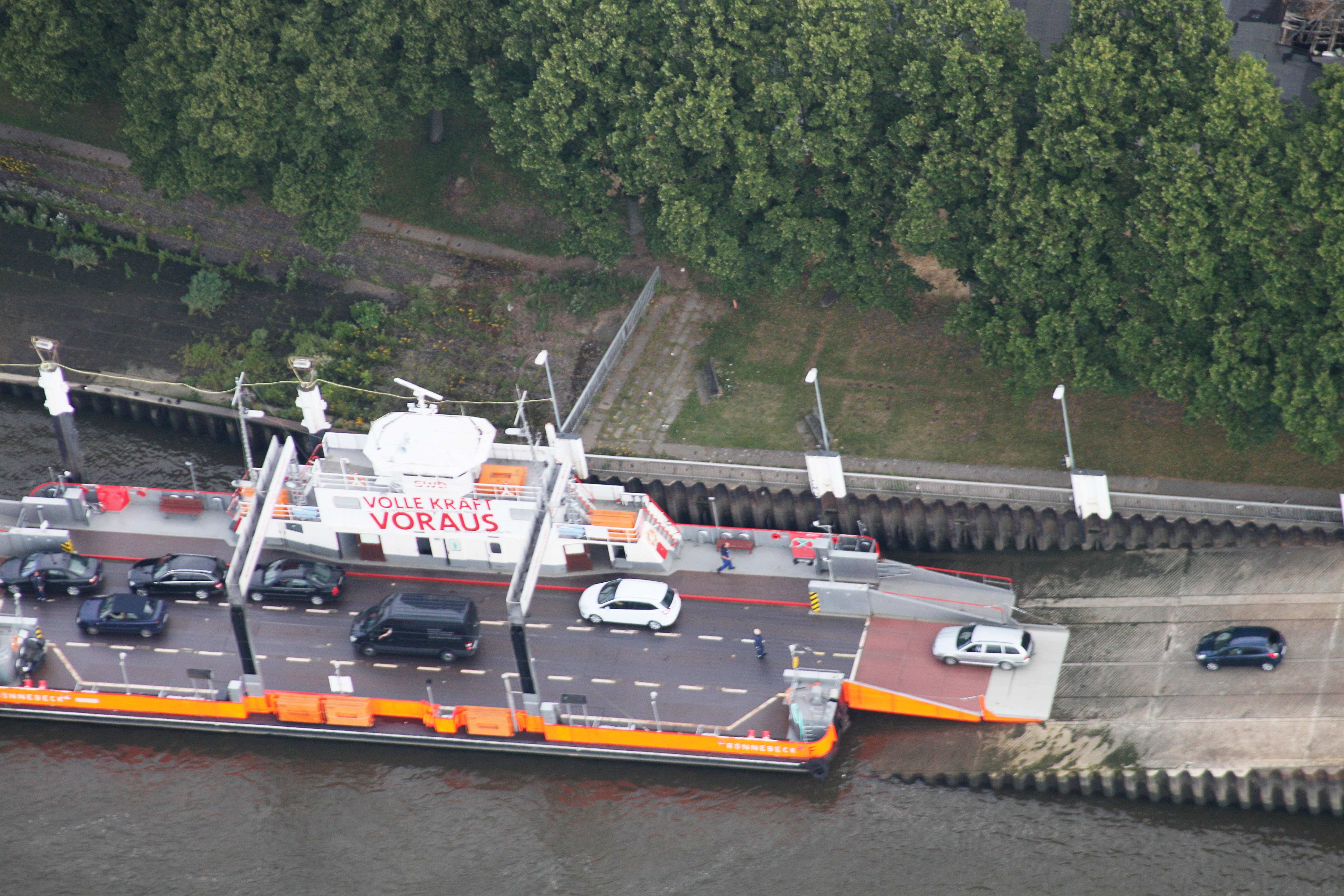 Auto- und Personenfähre „Rönnebeck“ in Blumenthal; Bremen Nord; Fotoflug Bremen; Flughöhe 500 m; Luftbilder Bremen-Nord: vom U-Boot Bunker Valentin bis Vegesack ; Flug entlang der Weser von West nach Ost, über dem linken Weserufer, mit Blickrichtung zum rechten Weserufer